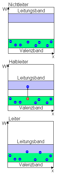 Bändermodell eines Halbleiters, GFDL gezeichnet von Honina 04:36, 6. Okt 2003 (CEST)